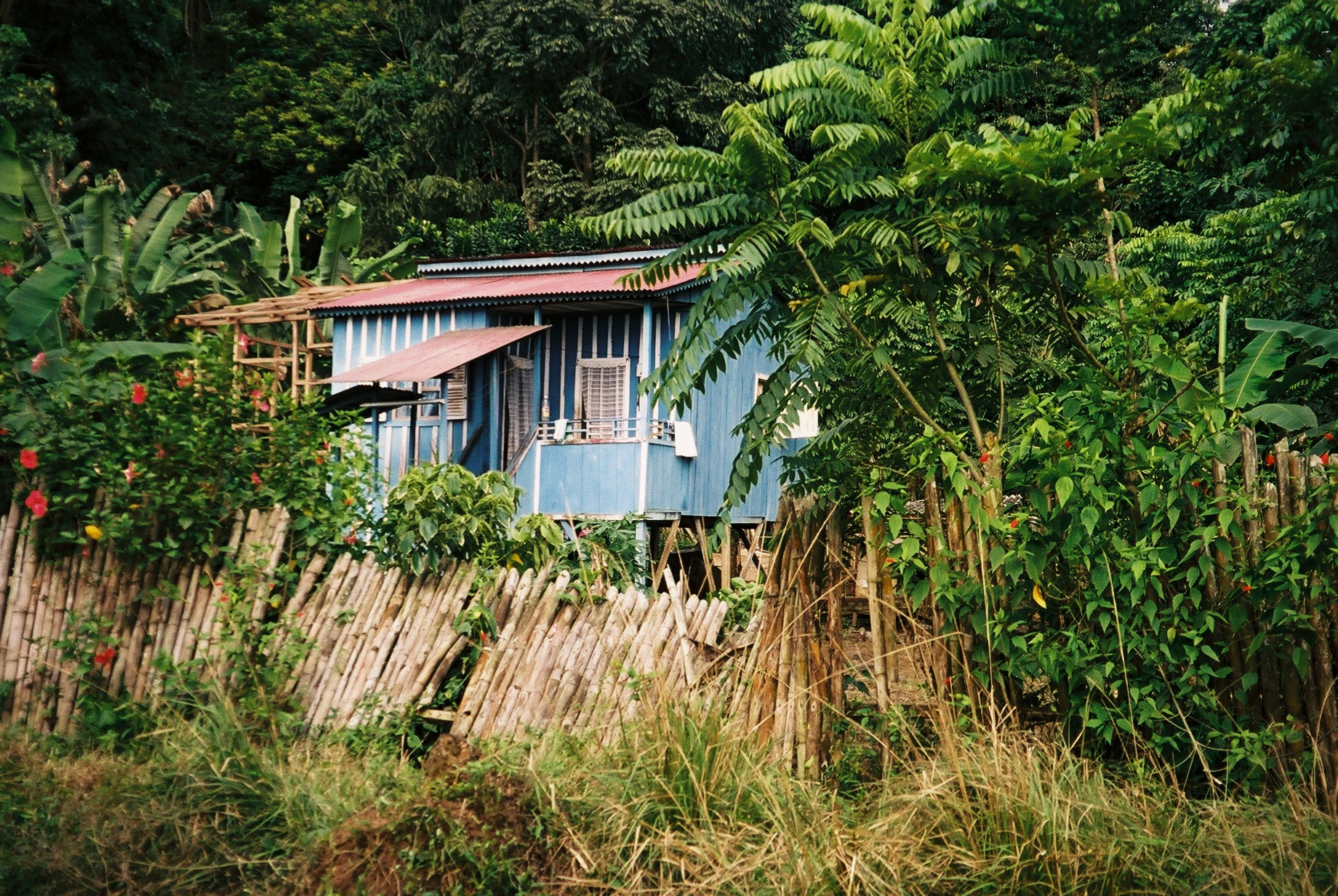 São Tomé e Principe